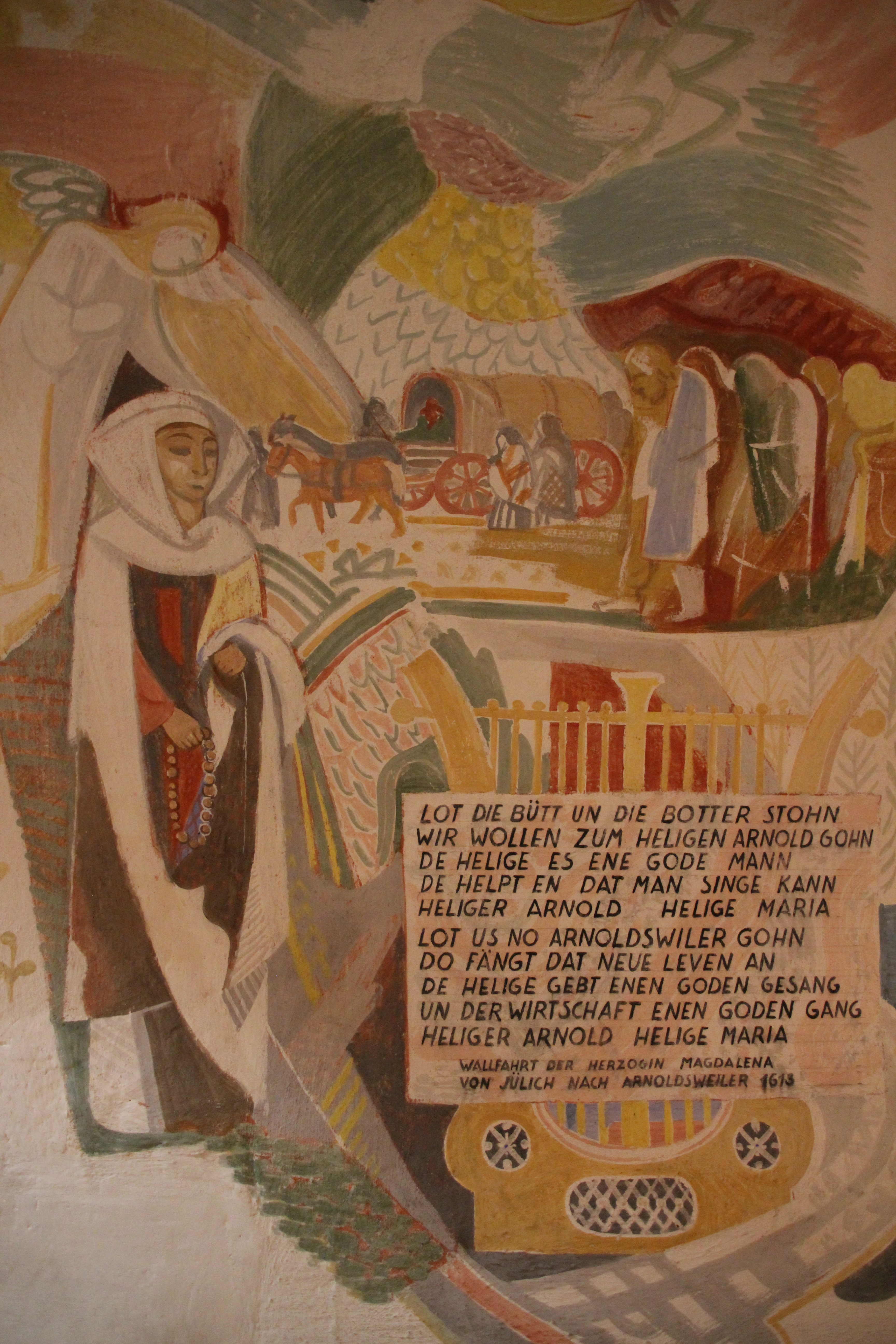 Wandgemälde "Wallfahrt der Herzogin Magdalena von Jülich nach Arnoldsweiler 1613" von Peter Hecker (1952) in Klein St. Arnold in Arnoldsweiler.